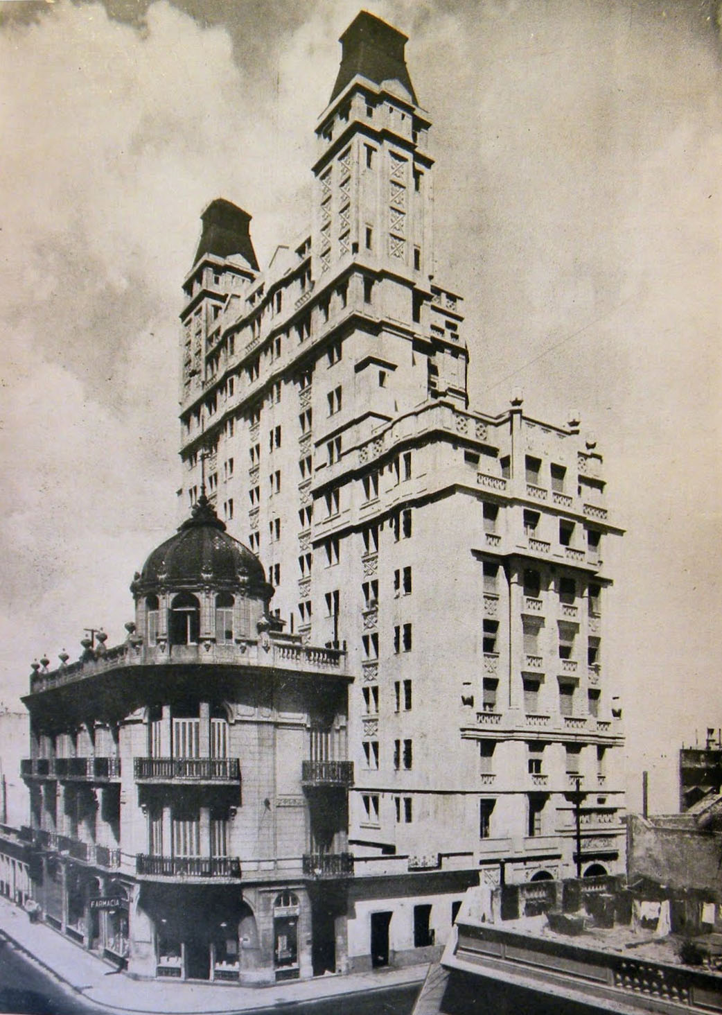 Edificio residencial conocido como Torre Saint, en la calle Juan D. Perón (ex Cangallo) 2630, en Buenos Aires.